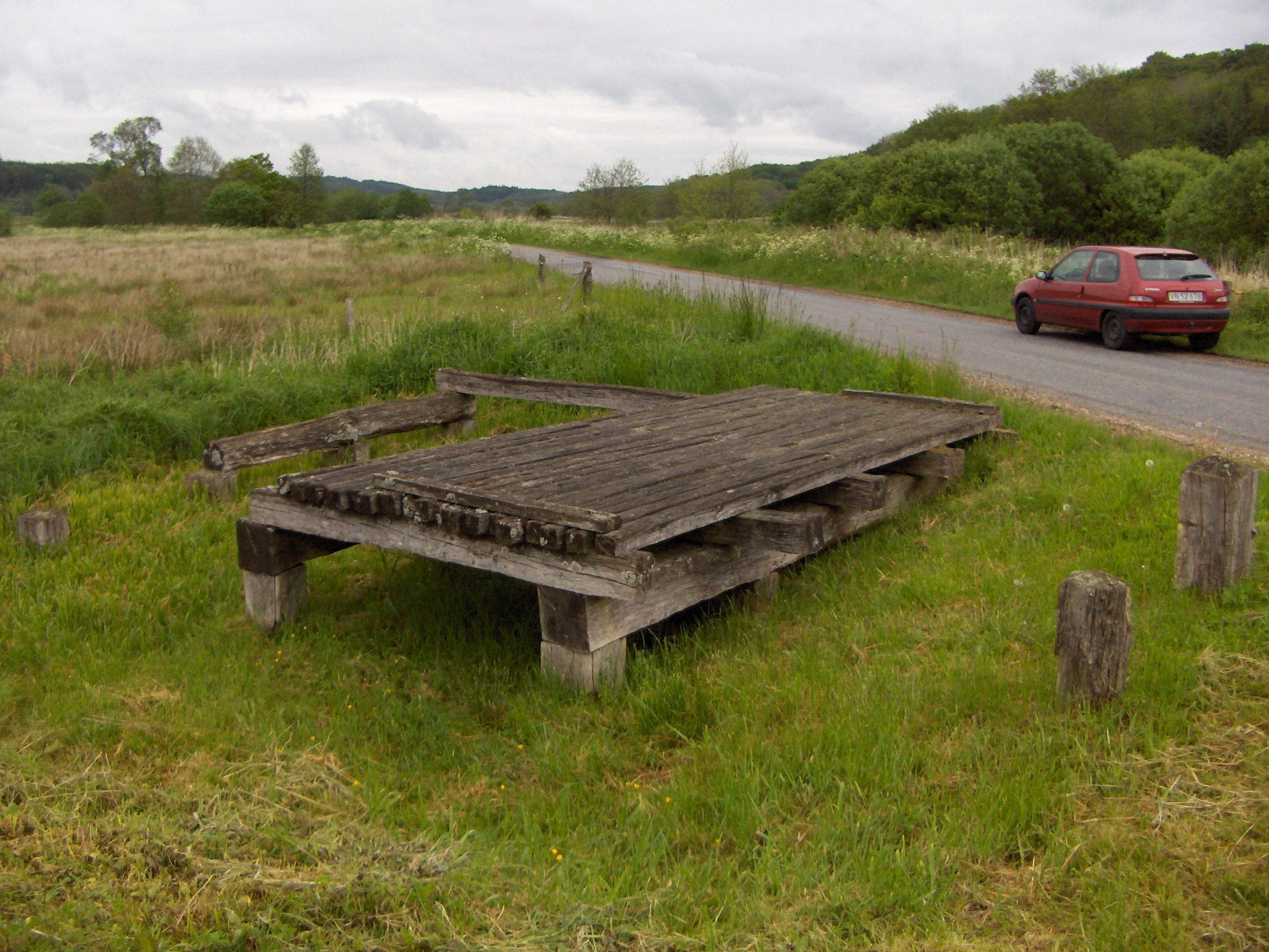 Rekonstruktion af Ravningbroen ved dens sydlige ende